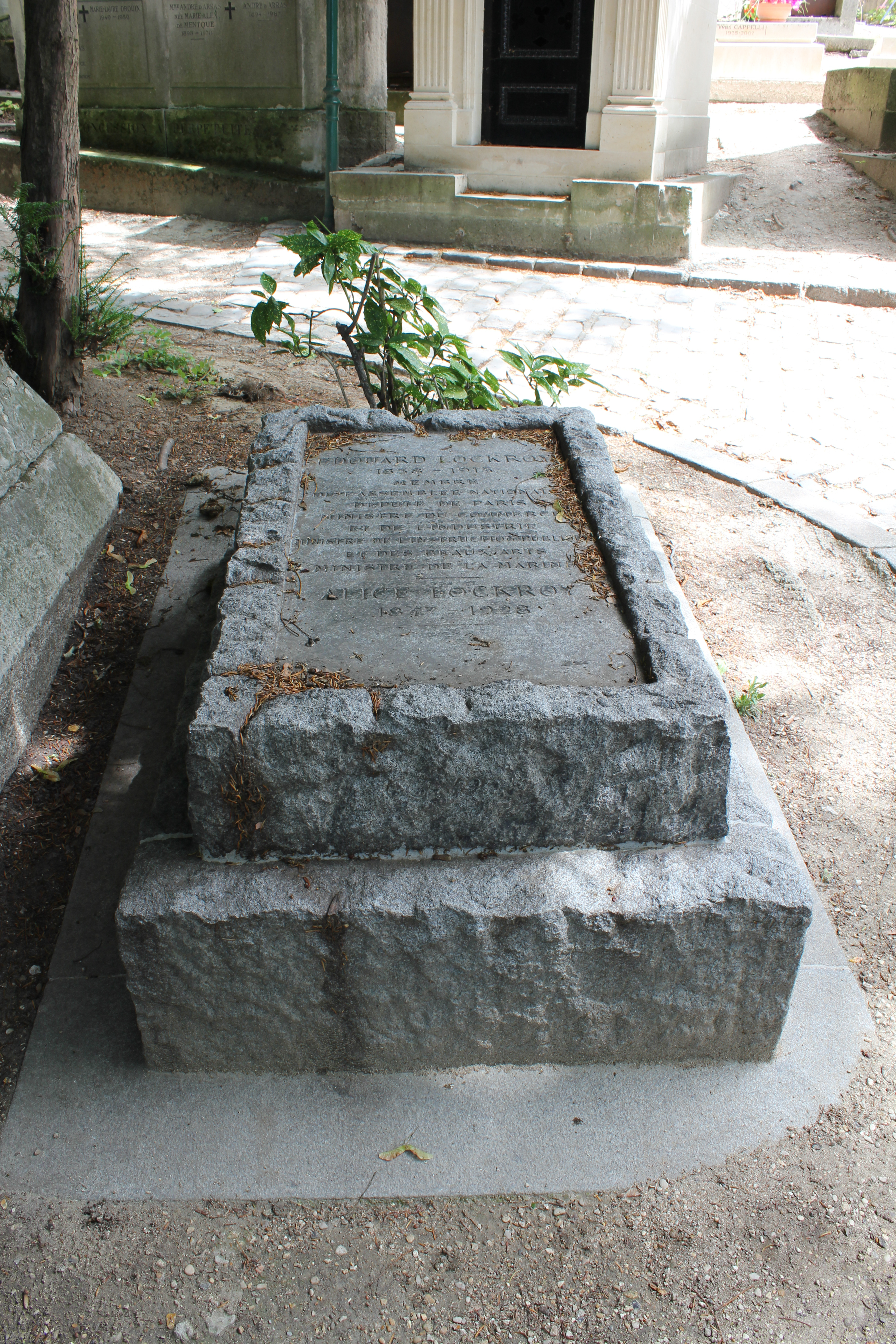 vue d'ensemble